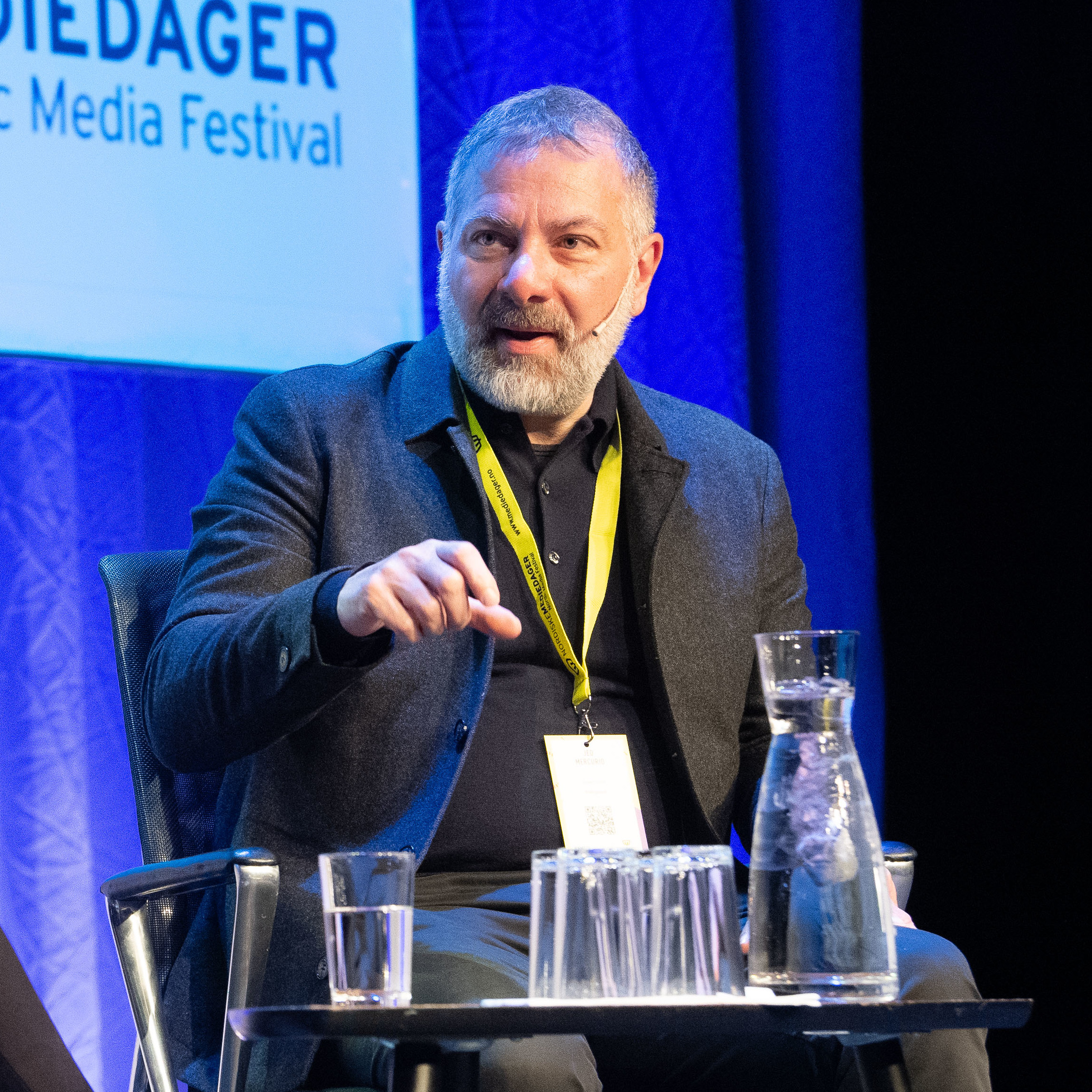 Bodyguard